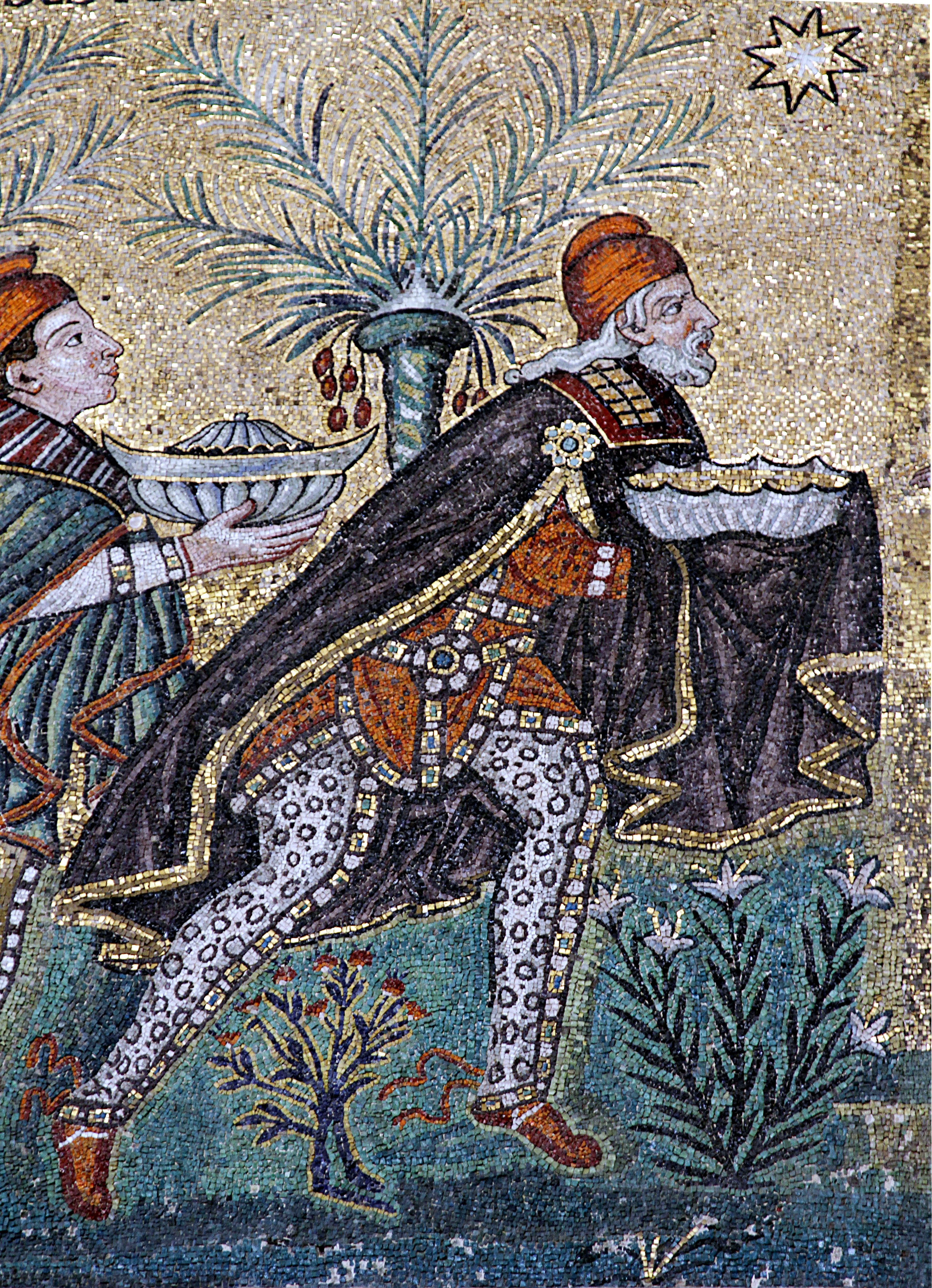 Sant'Apollinare Nuovo - Ravenna